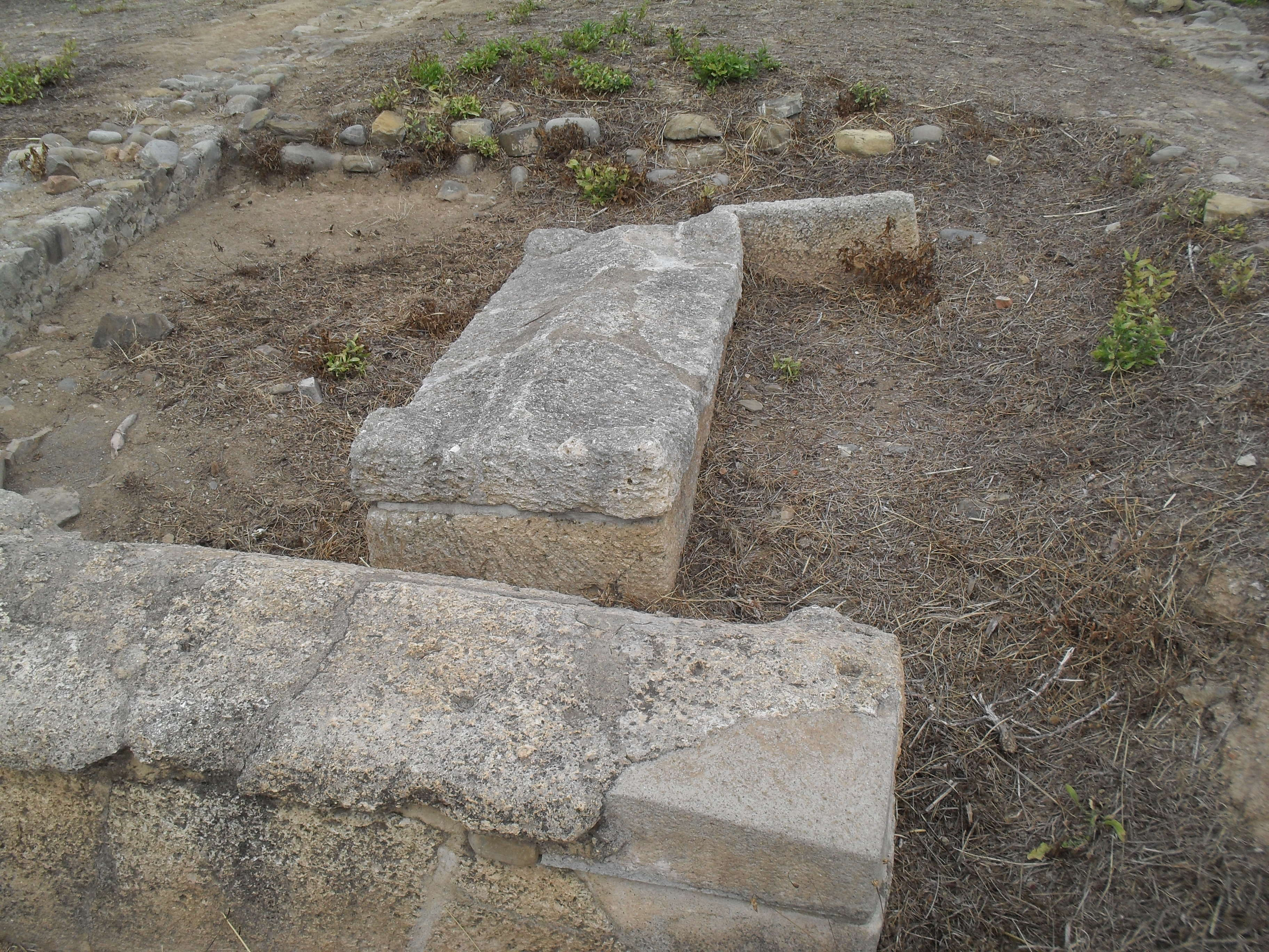 Sepolture all'interno della zona archeologica di Costa Balenae, Riva Ligure (IM)